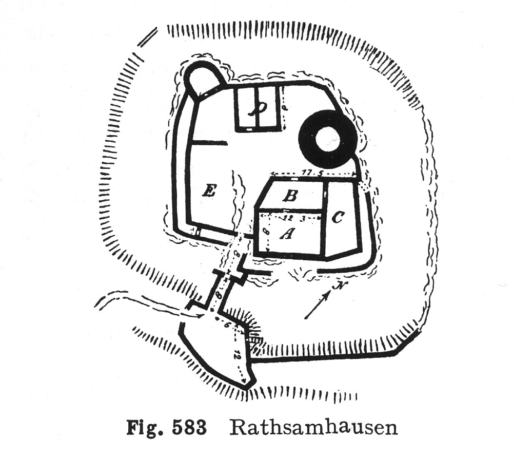 Burg Rathsamhausen, älterer Grundriss. A: Wohnturm, B: Hof der Kernburg, C: Wohnbau, E: Küche, p: Unbekanntes Gebäude des 15. Jahrhunderts